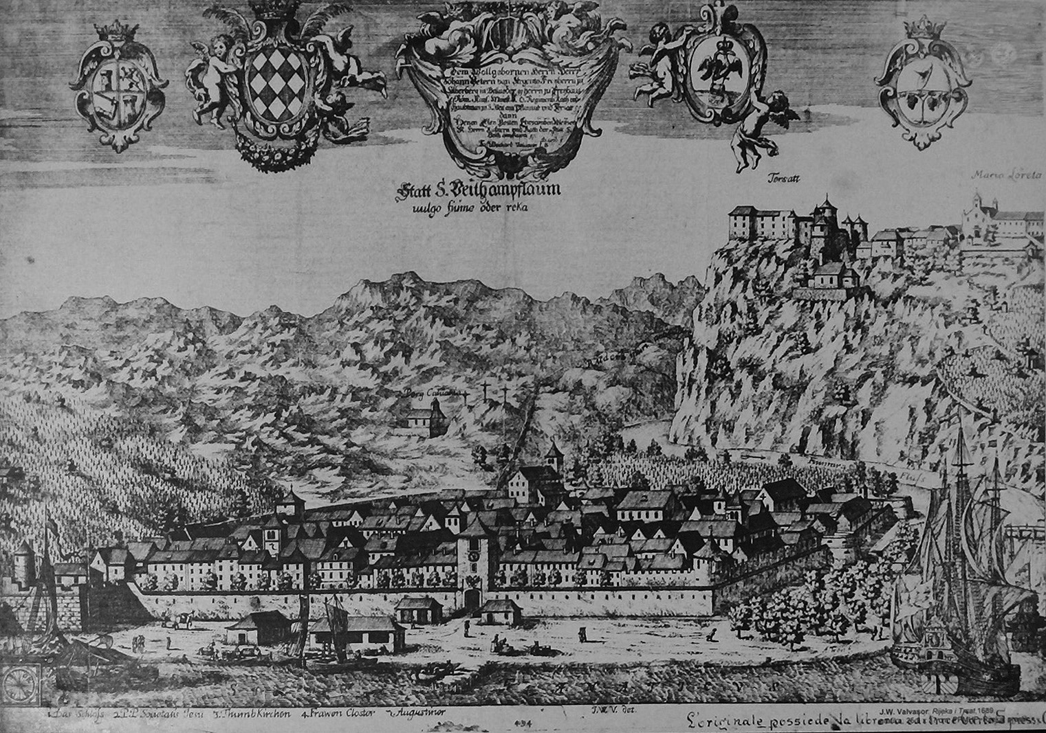 St. Veit am Flaum (1689), German name for Rijeka; Trsat Castle, Rijeka, Croatia